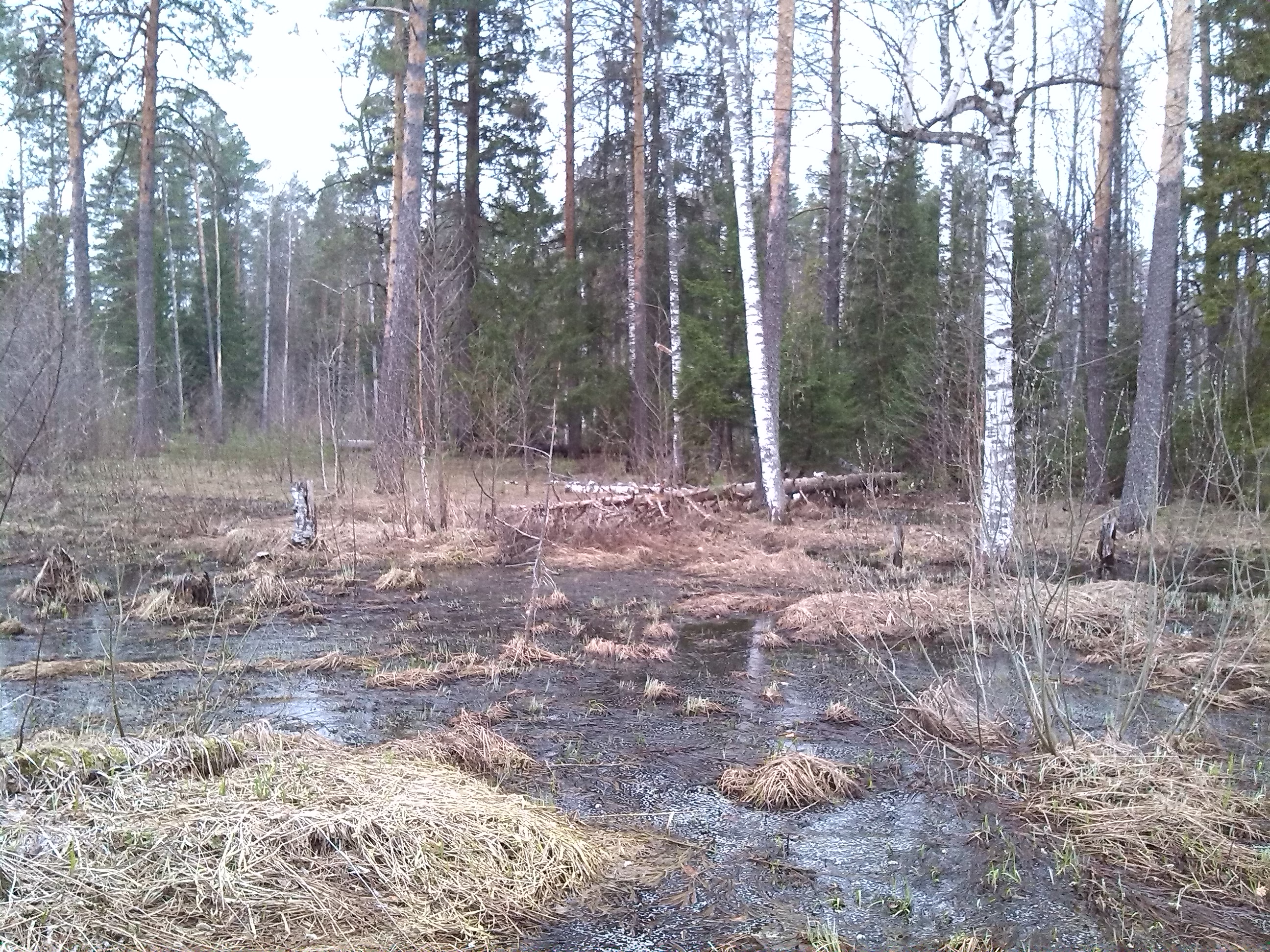 сплав